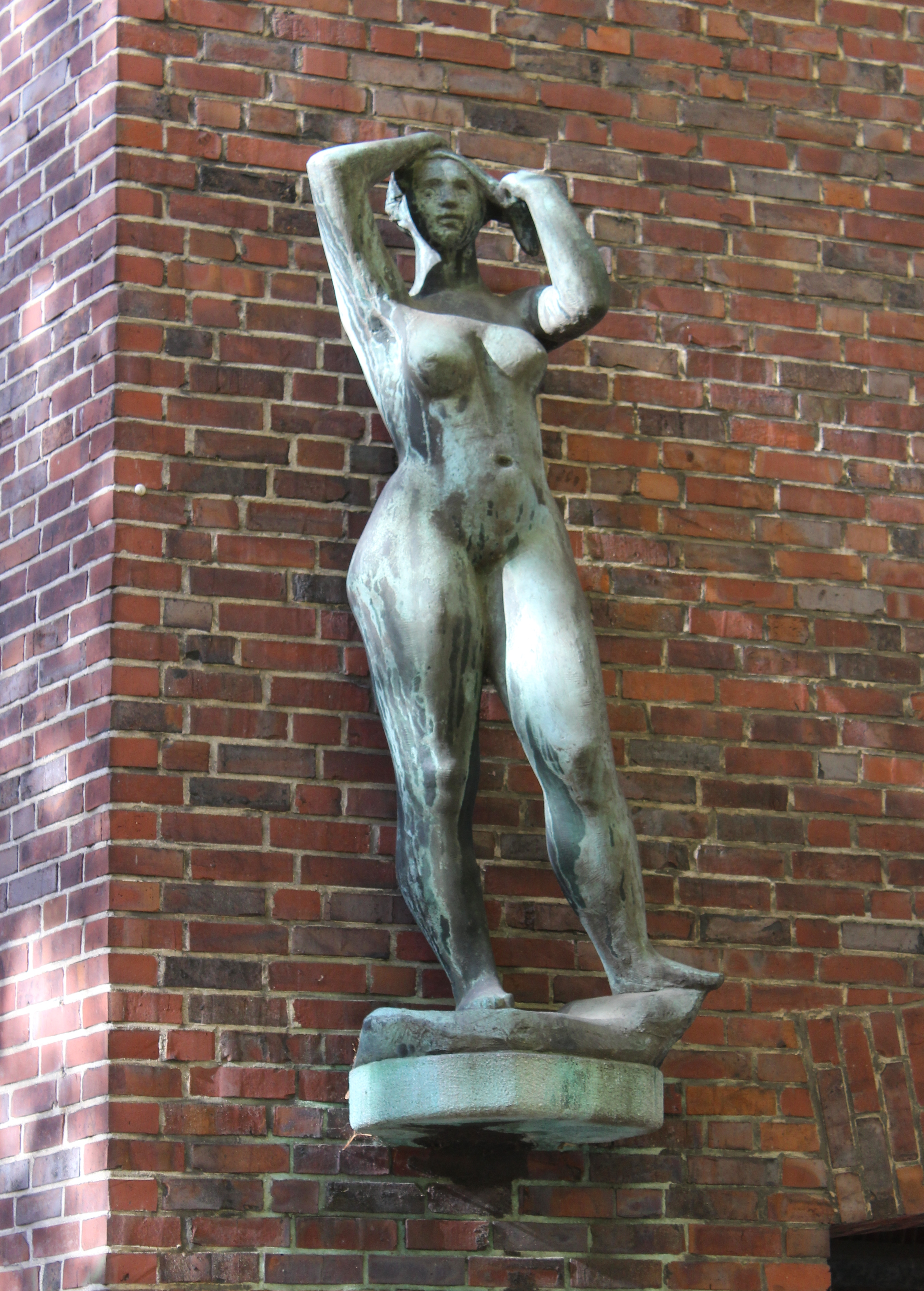 "Frau mit erhobenen Armen" (1952). Skulptur von Curt Beckmann (1901-1970). Düppelstraße 25, Hamburg-Altona-Nord